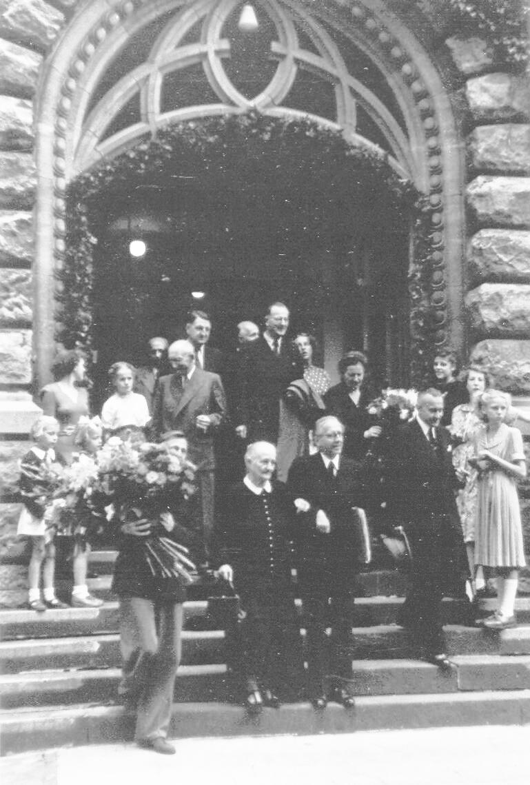 Foto anlässlich der Schulumbenennung zum 75. Geburtstag von Hildegard Wegscheider